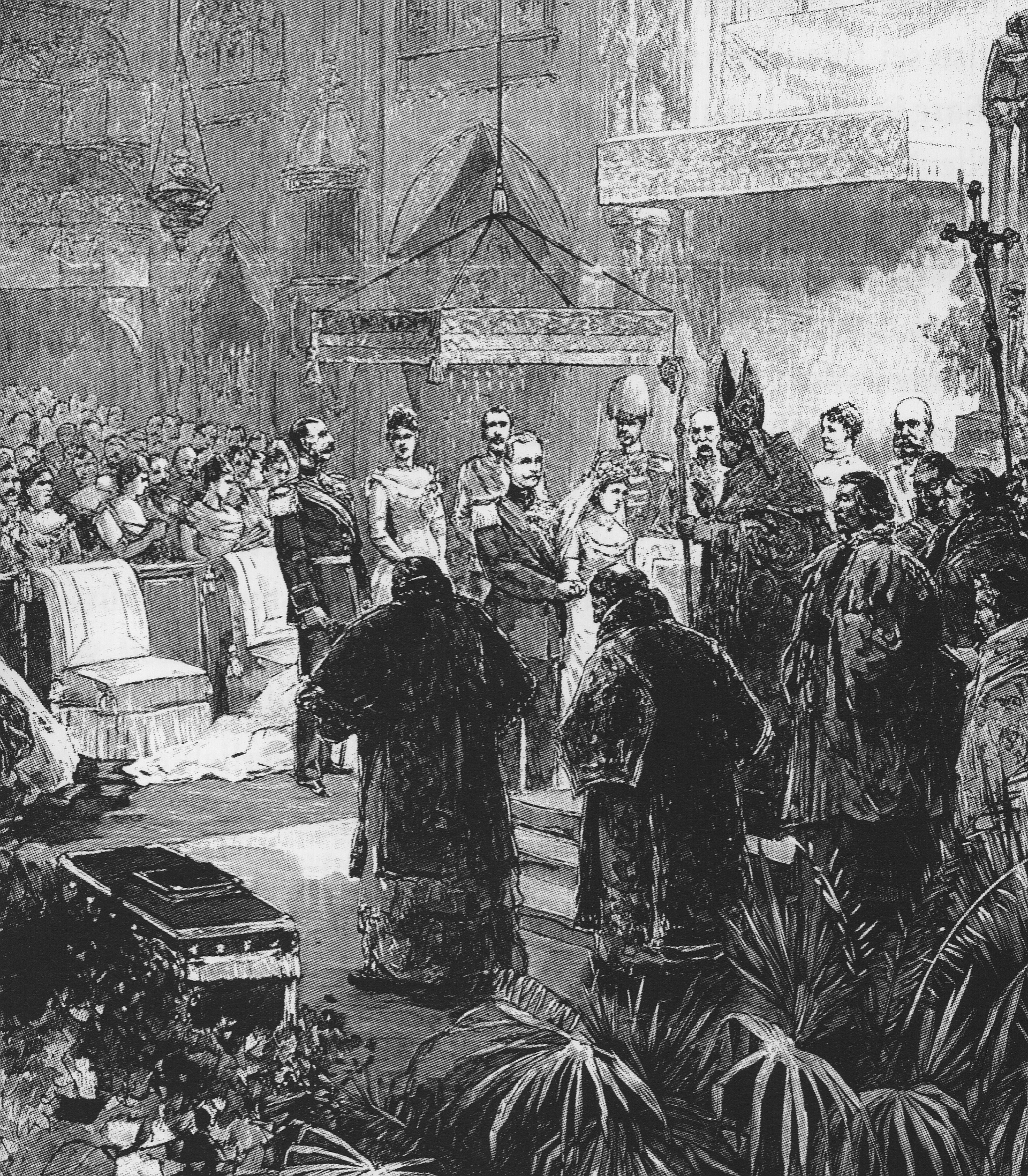 Hochzeit Friedrich August und Luises am 21. November 1891 nach einer Zeichnung von Wilhelm Gause